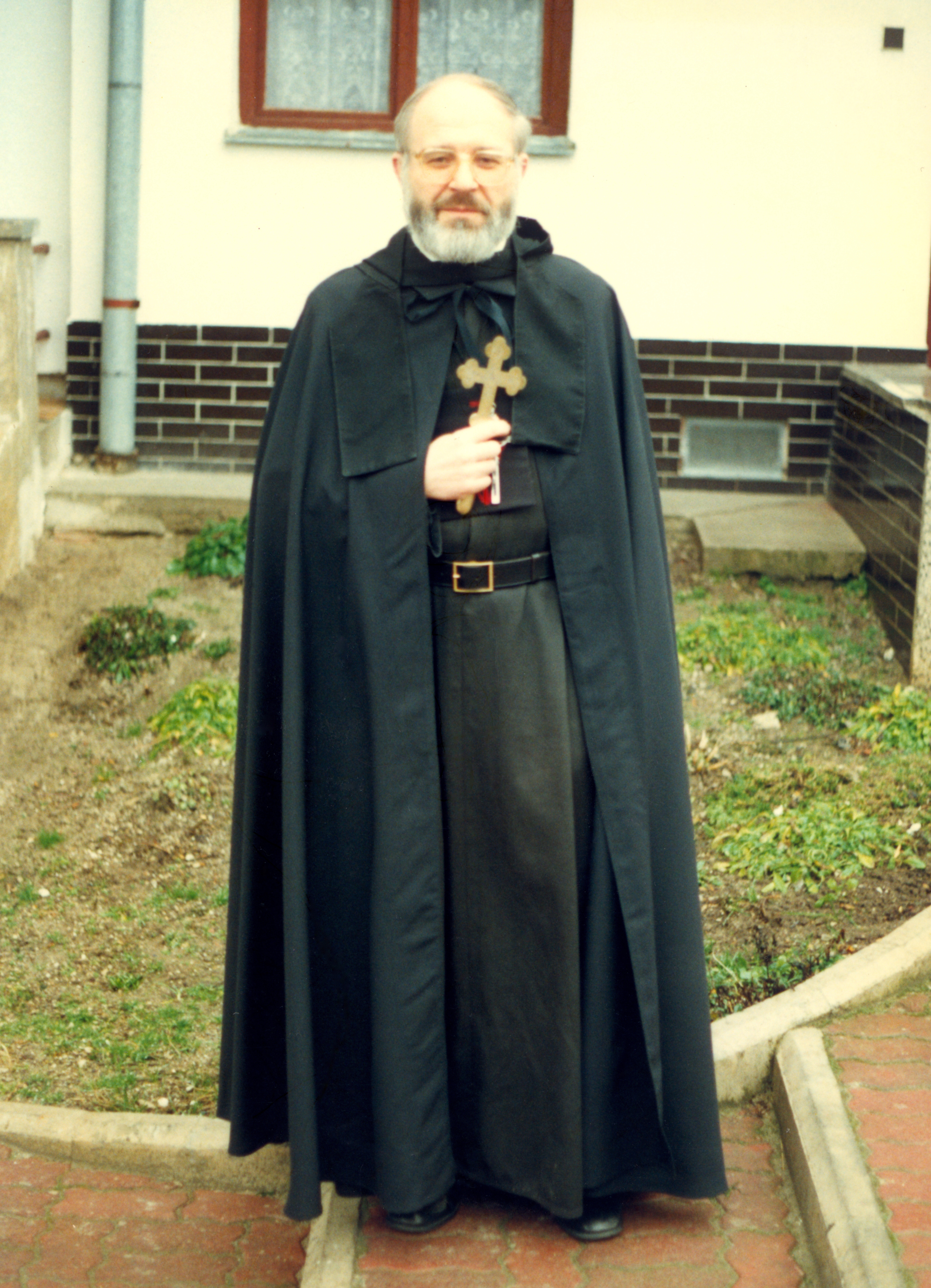 o. Eliáš Antonín Dohnal, OSBM, v r. 1996. Photo taken by Jozafát Vladimír Timkovič, OSBM